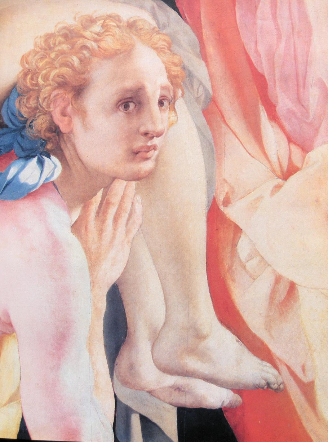 Fresque de la Descente de Croix de Pontormo